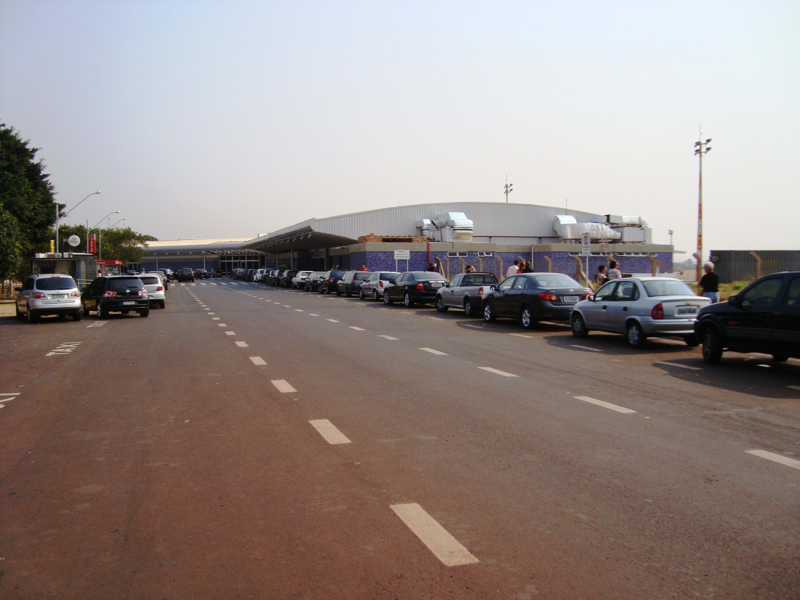 Aeroporto Leite Lopes - Lotado